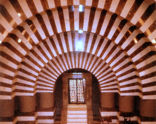 Синагогу "Золота Роза" у Дніпропетровськ